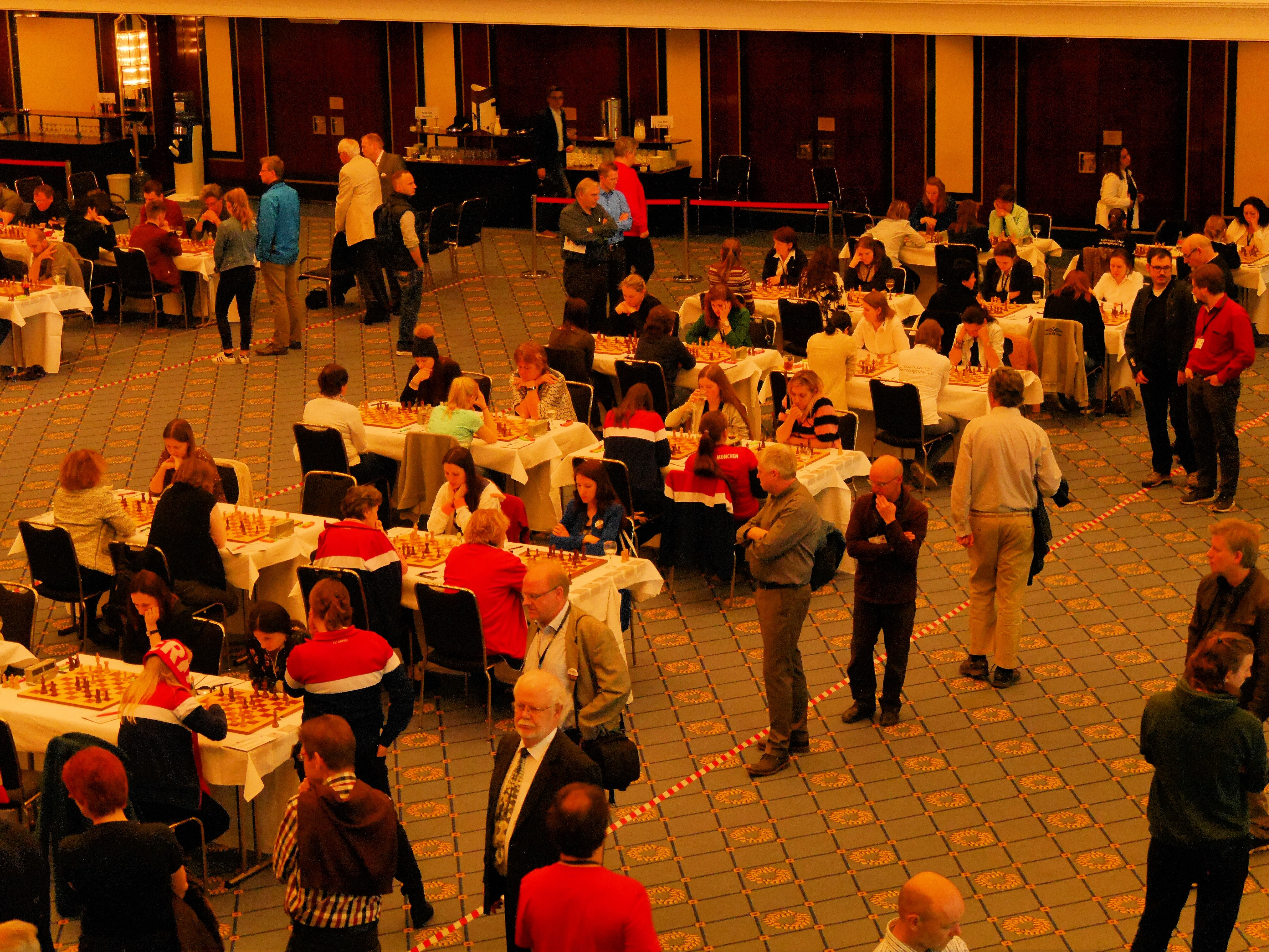 Die Bretter der Schachbundesliga der Frauen im Hotel Maritim, Finalrunden der deutschen Schachbundesliga 2017 in Berlin.